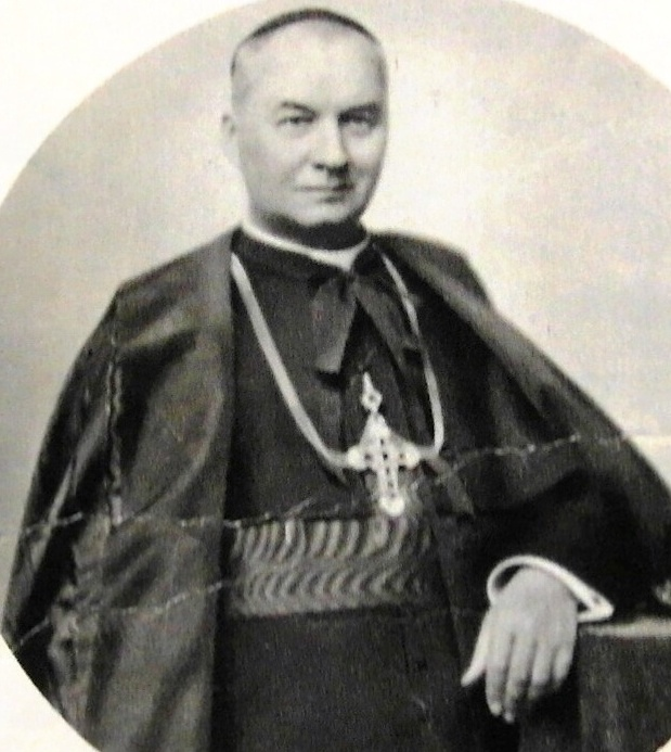 Je to fotografie zhotovená z publikace "Pražský katolický sjezd" proto, že na Wikipedii u profilu k. K. schází fotografie kardinála Kašpara, ale vědět co to obnáší, bych žádnou fotku nedodával.